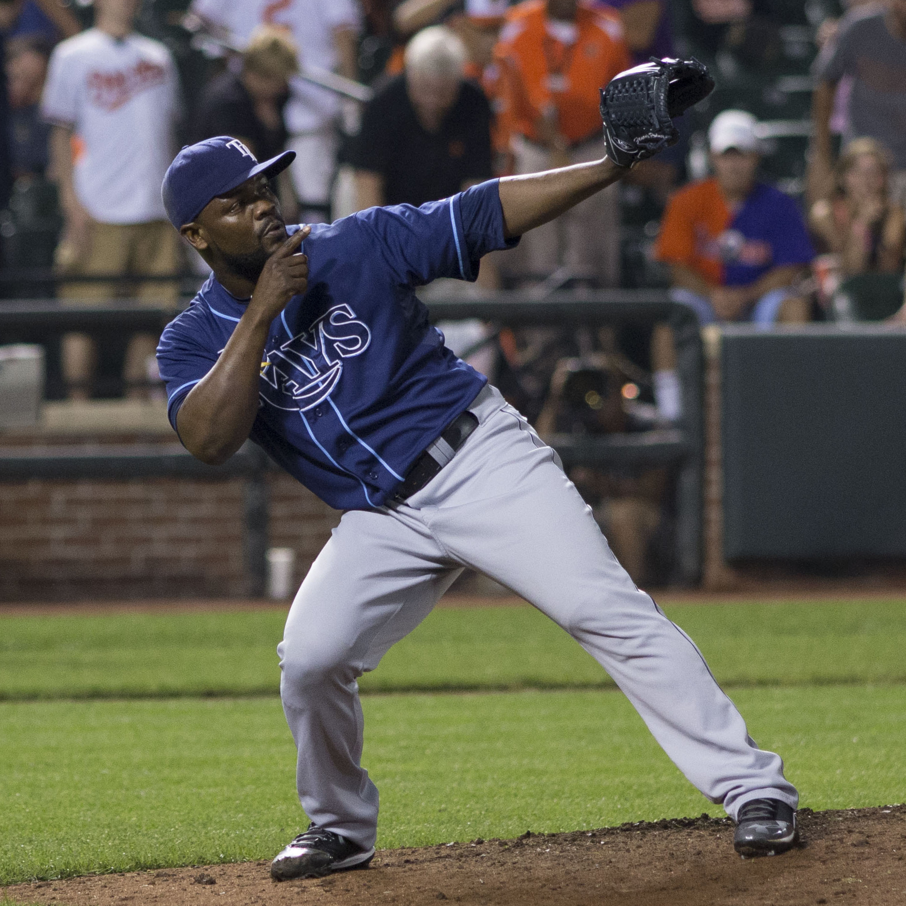 Fernando Rodney